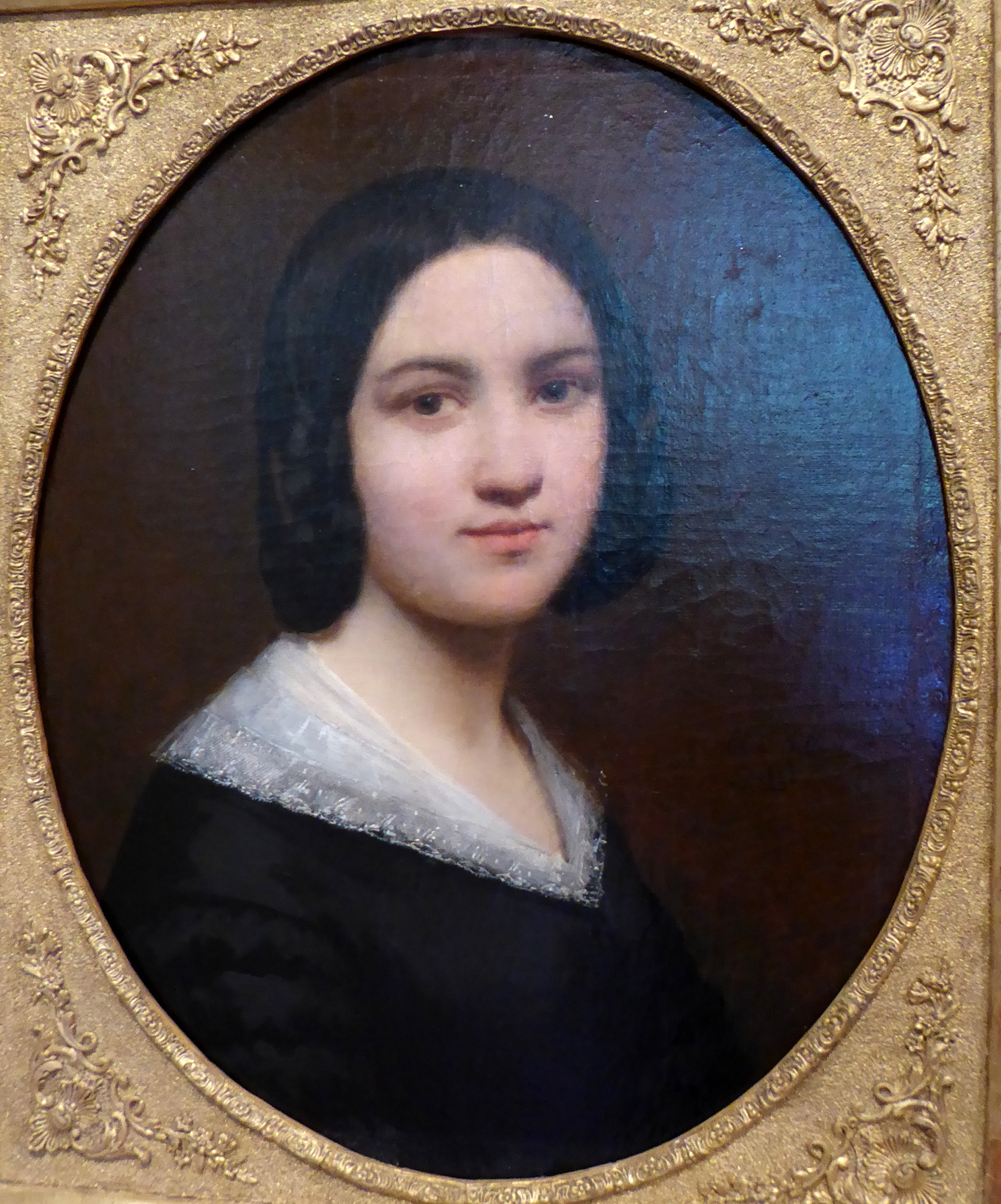 Portrait de Clara Filleul par elle-même, musée municipal, château Saint-Jean, Nogent-le-Rotrou, Eure-et-Loir (France). Huile sur toile, hauteur 51 cm, largeur 40,5 cm, signé et daté au milieu à droite : Clara Filleul, 1842. Don de l'artiste, restauré en 1996, inv. 1958.477.